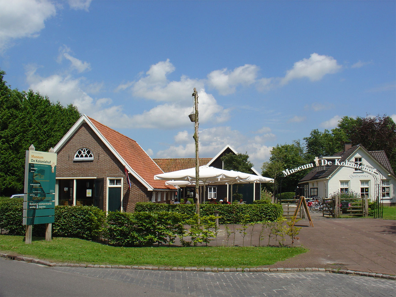 Museum De Koloniehof in Frederiksoord